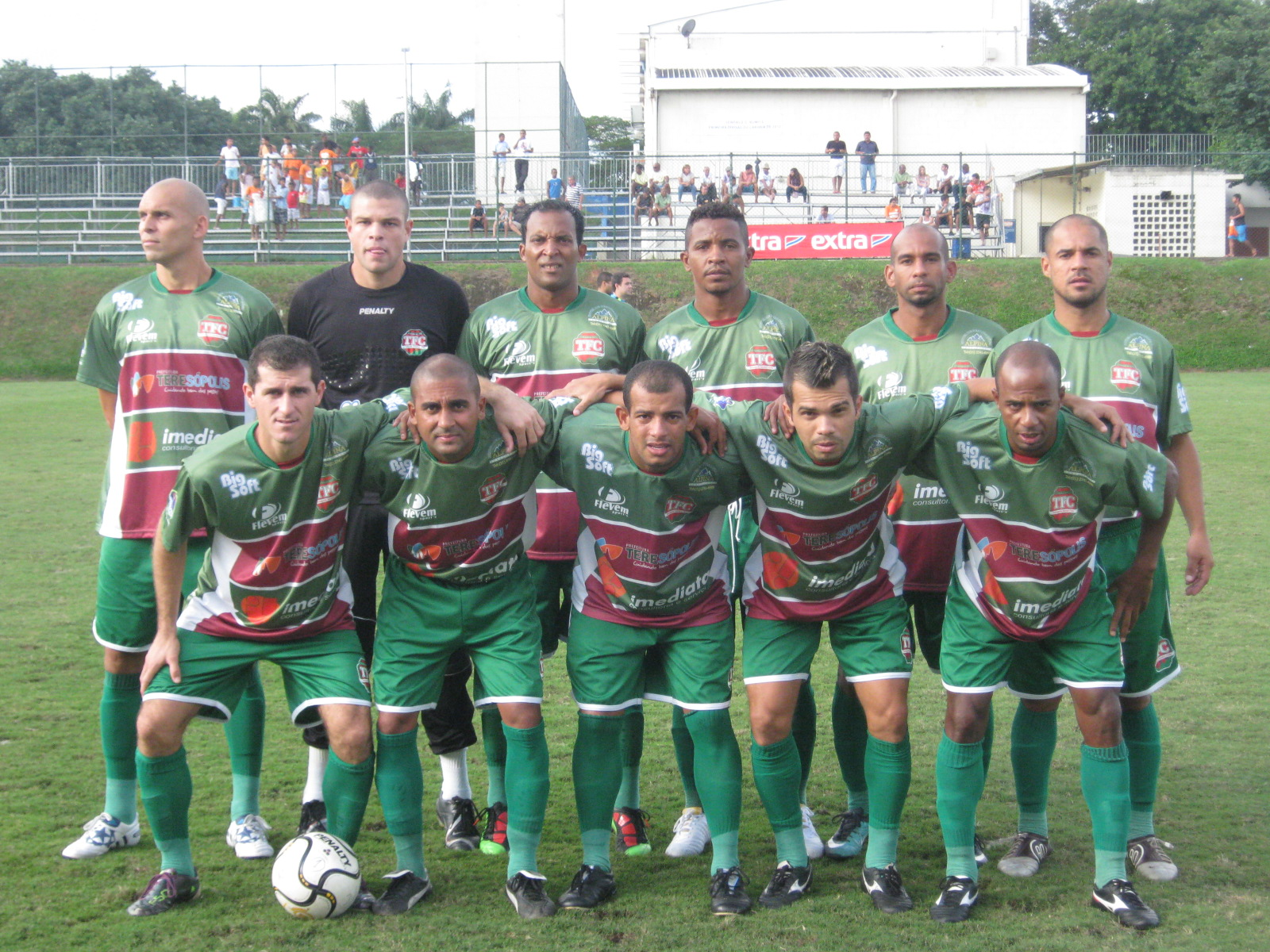 Equipe profissional do Teresópolis FC em 2011.